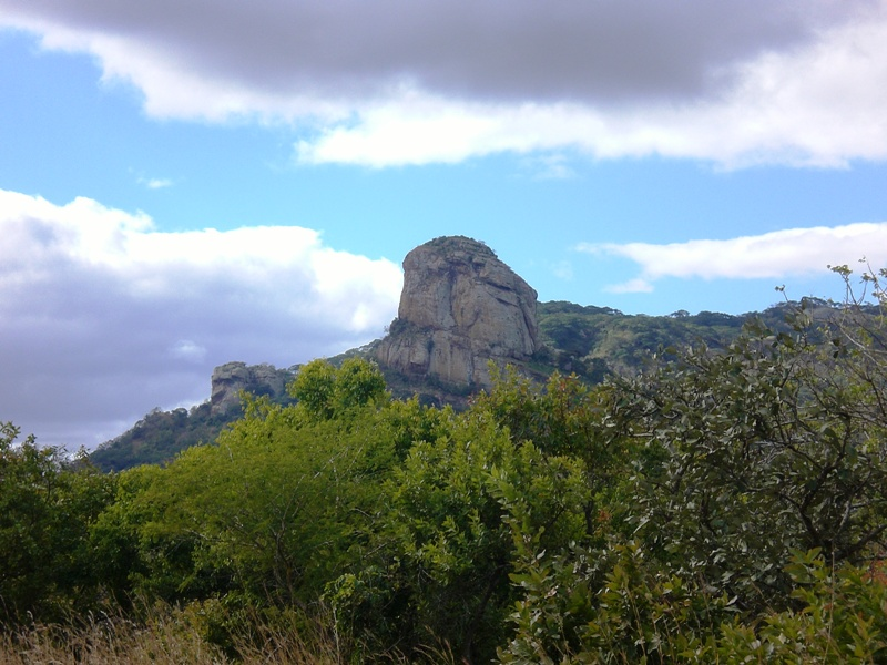 Monte_Calinga-Muci_no_distrito_de_Guru